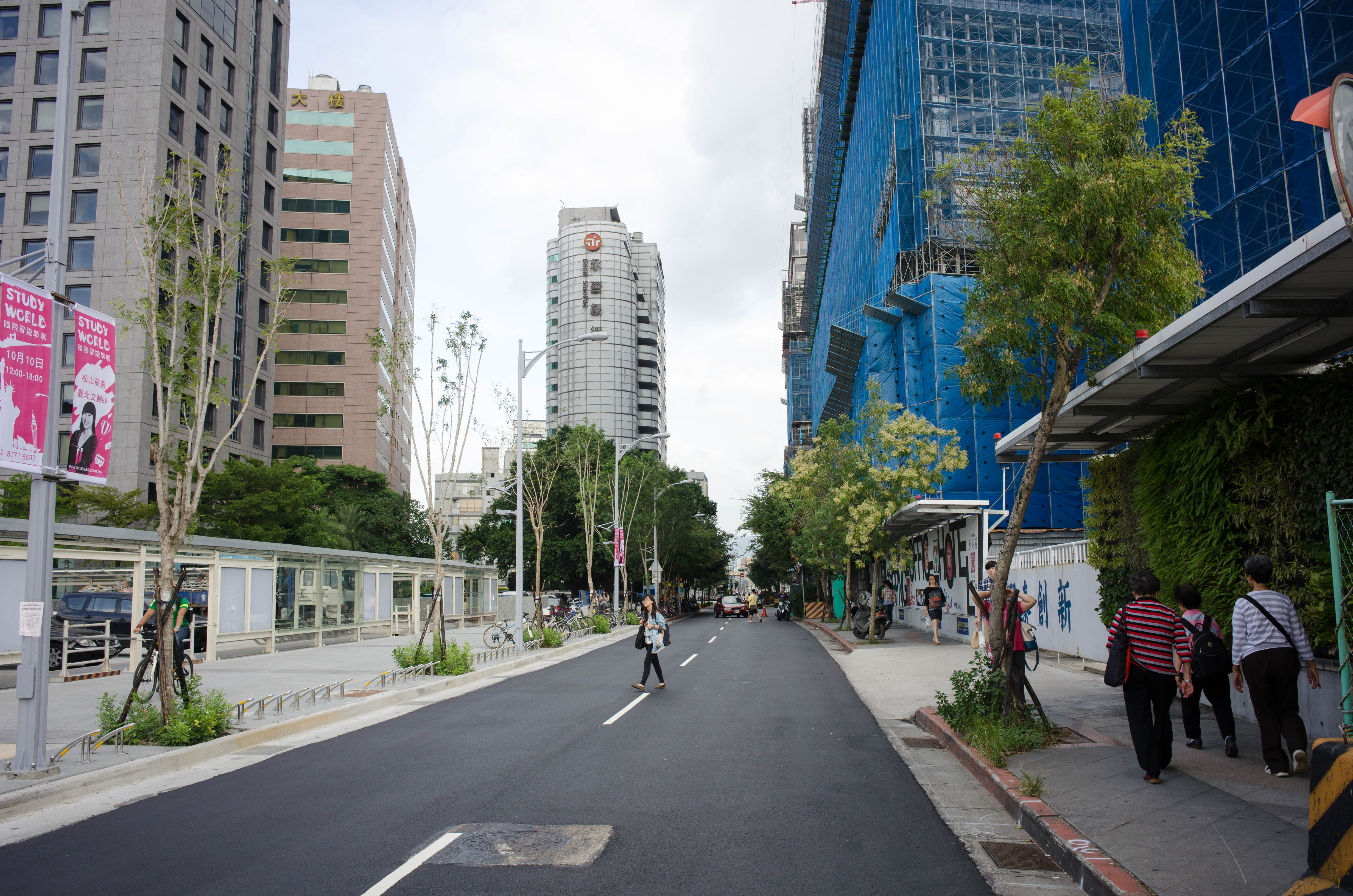 潤泰松山車站大樓興建工程工地北側與市民大道六段，從松山路與市民大道六段路口東望。中央建築物為永豐銀行松山作業大樓。